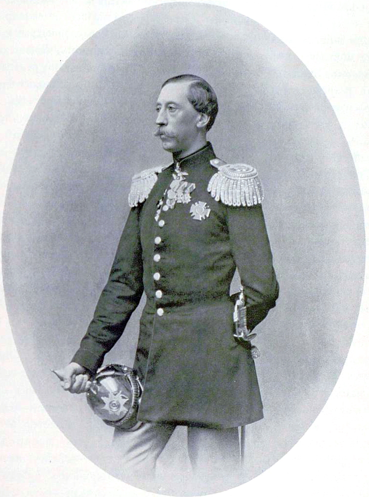 Владимир Иванович Барятинский, командир Кавалергардского полка с 9 апреля 1861 по 5 сентября 1866